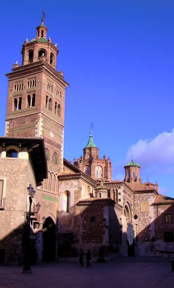 Catedral de Teruel